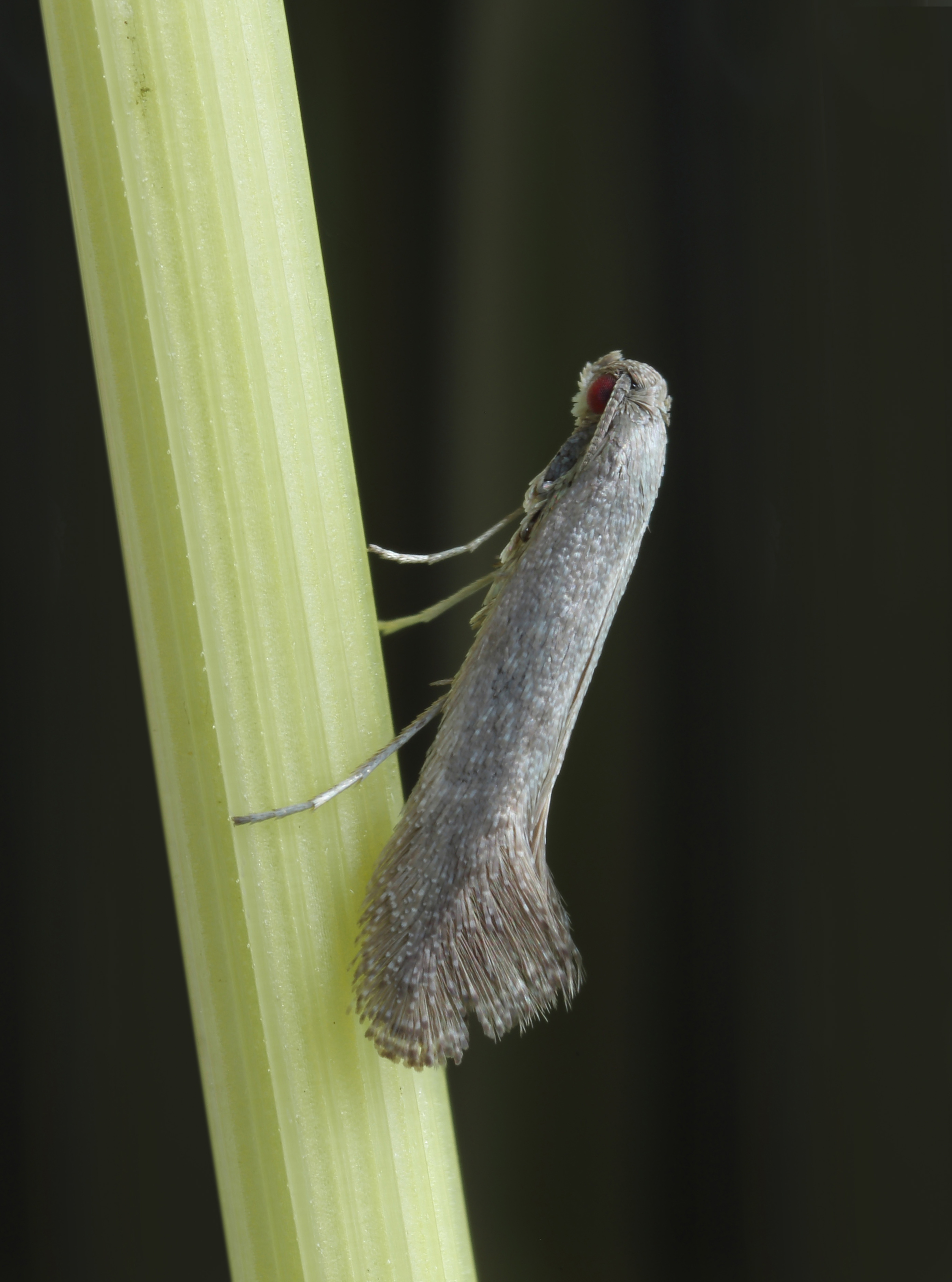 Tinagma ocnerostomella Snettisham, Norfolk.